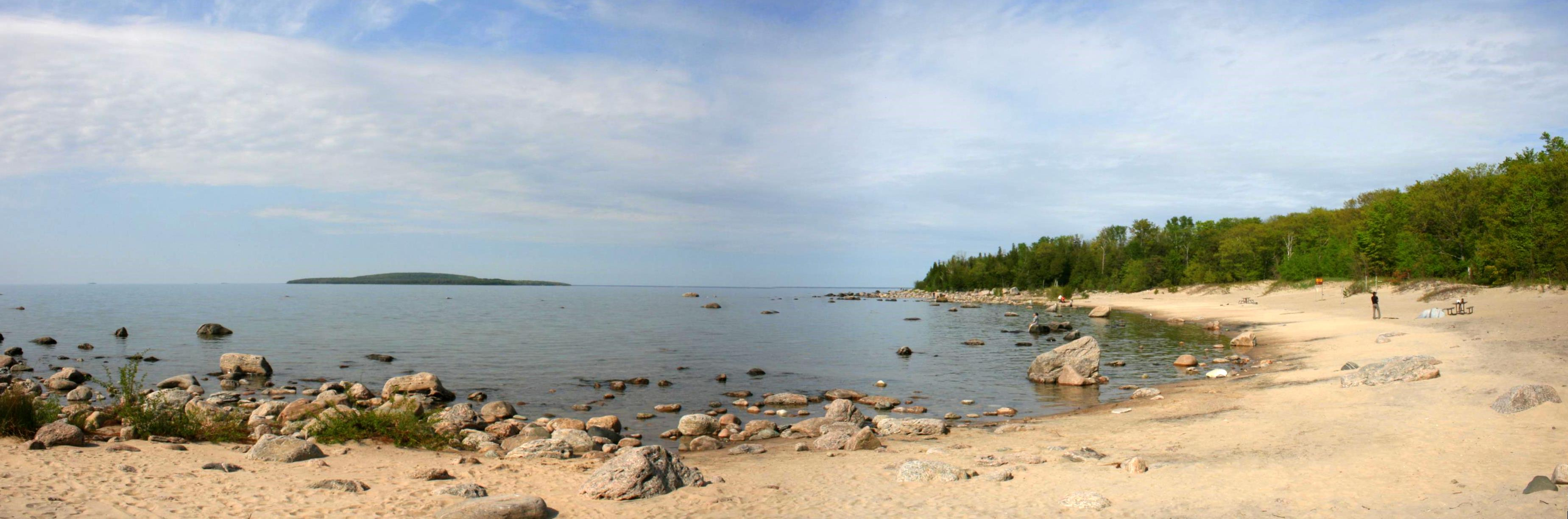 Awenda